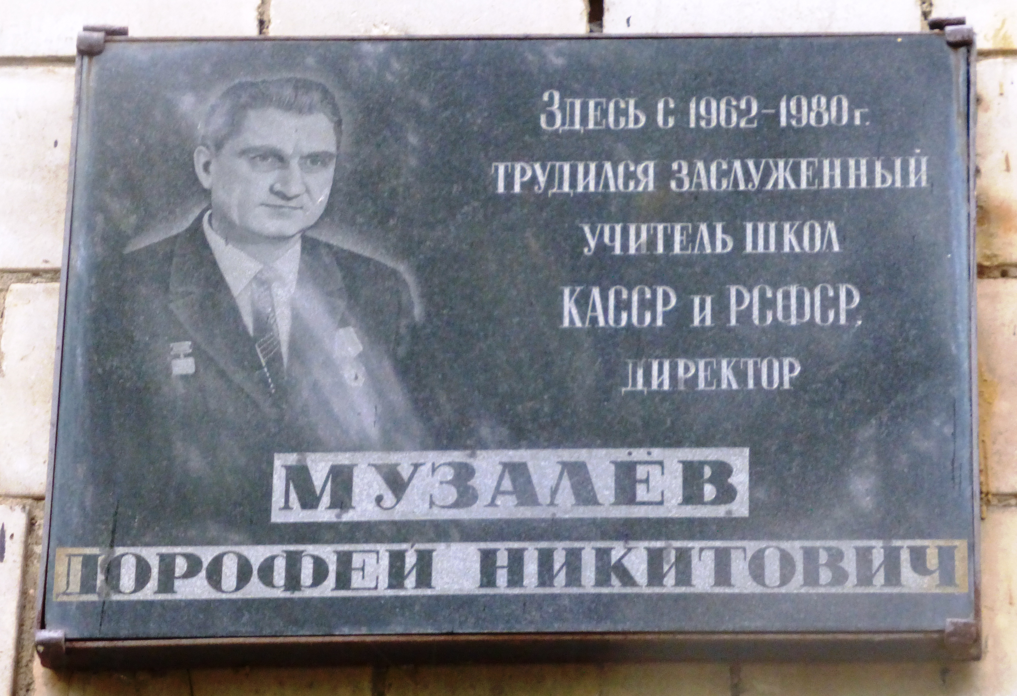 Памятная доска Музалёву Д.Н. на здании школы № 30 в Петрозаводске на ул.Еремеева